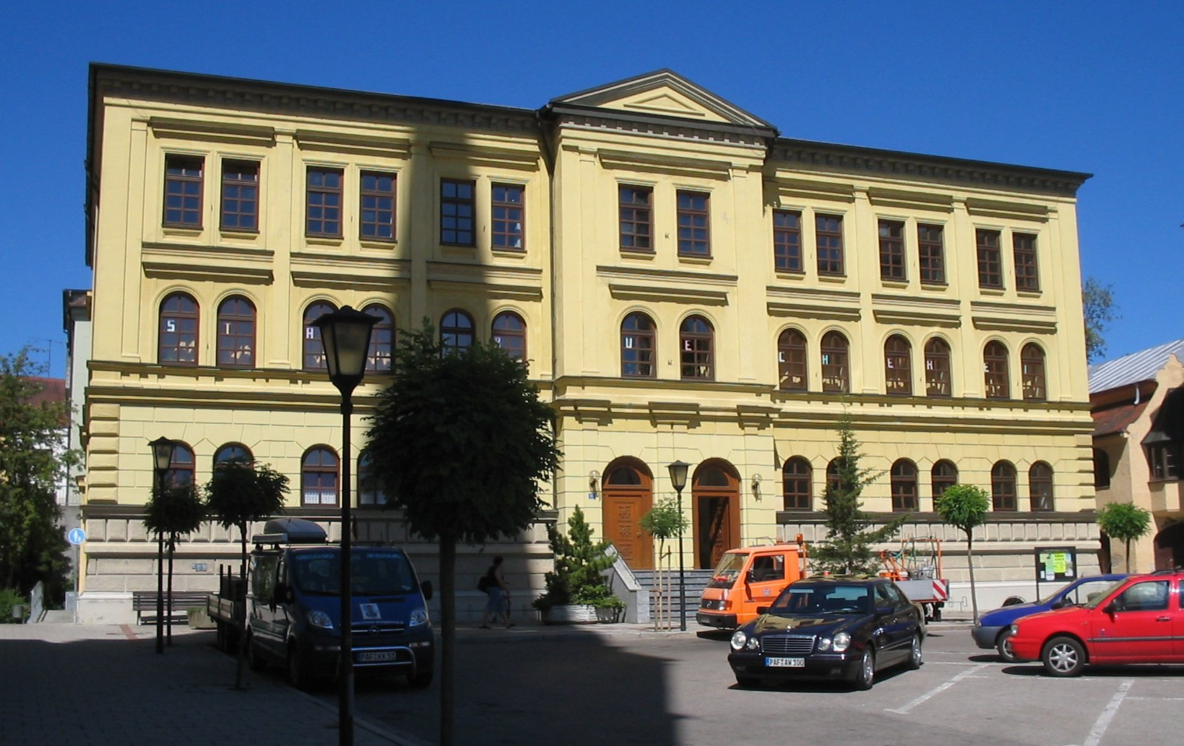 Haus der Begegnung (ehemalige Mädchenschule in Pfaffenhofen an der Ilm